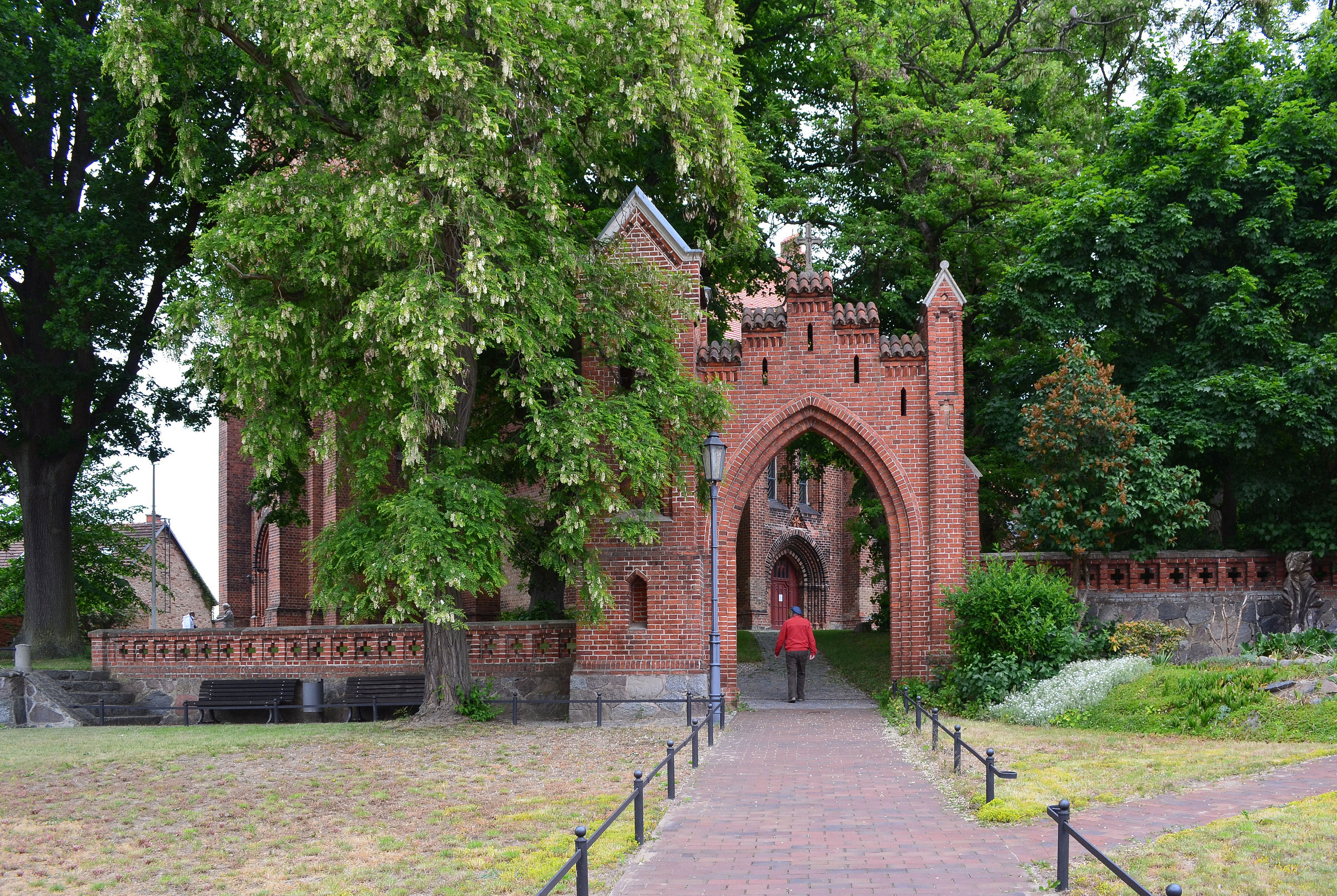 Röbel, Marienkirche, Seitentor außen